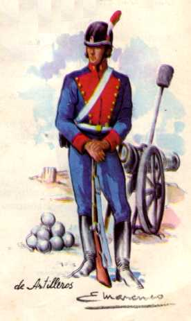 Artilleros